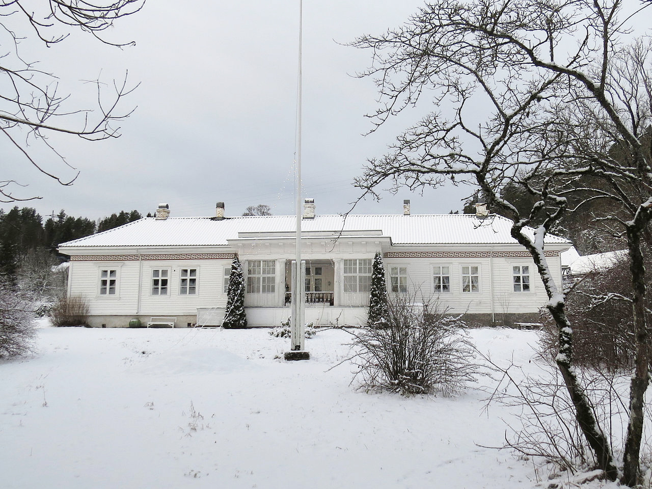 Bolvik (Bolvig) Gård, Kilebygda, Skien